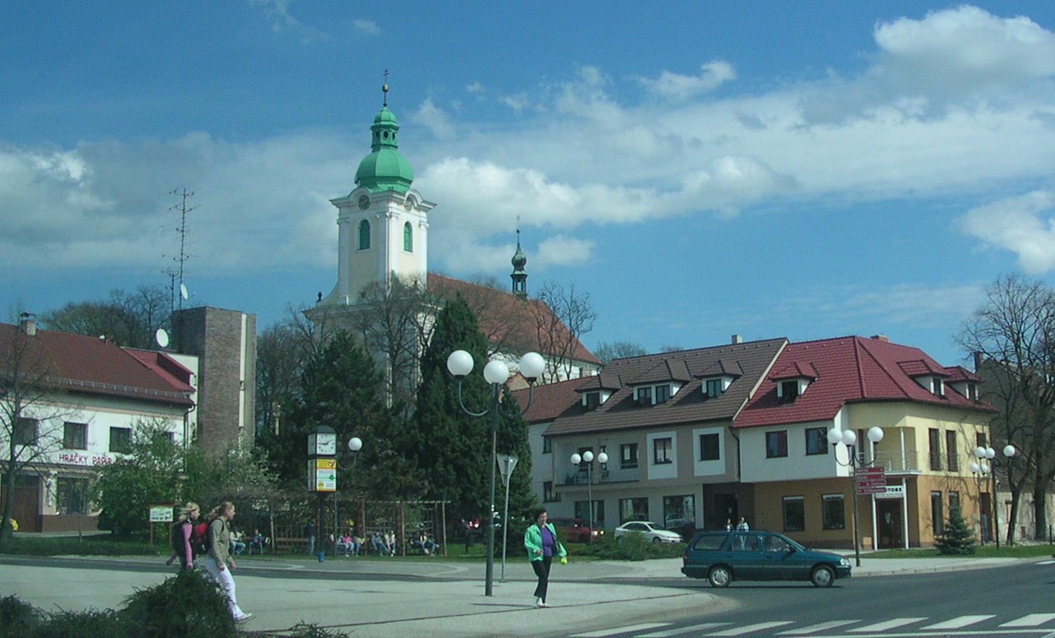 Bzenec